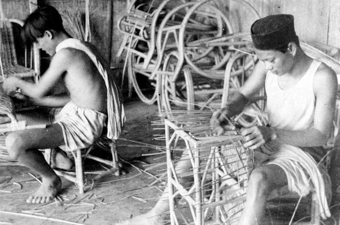 Repronegatief. Indonesiërs maken meubelstukken van rotan, Zuid-Celebes